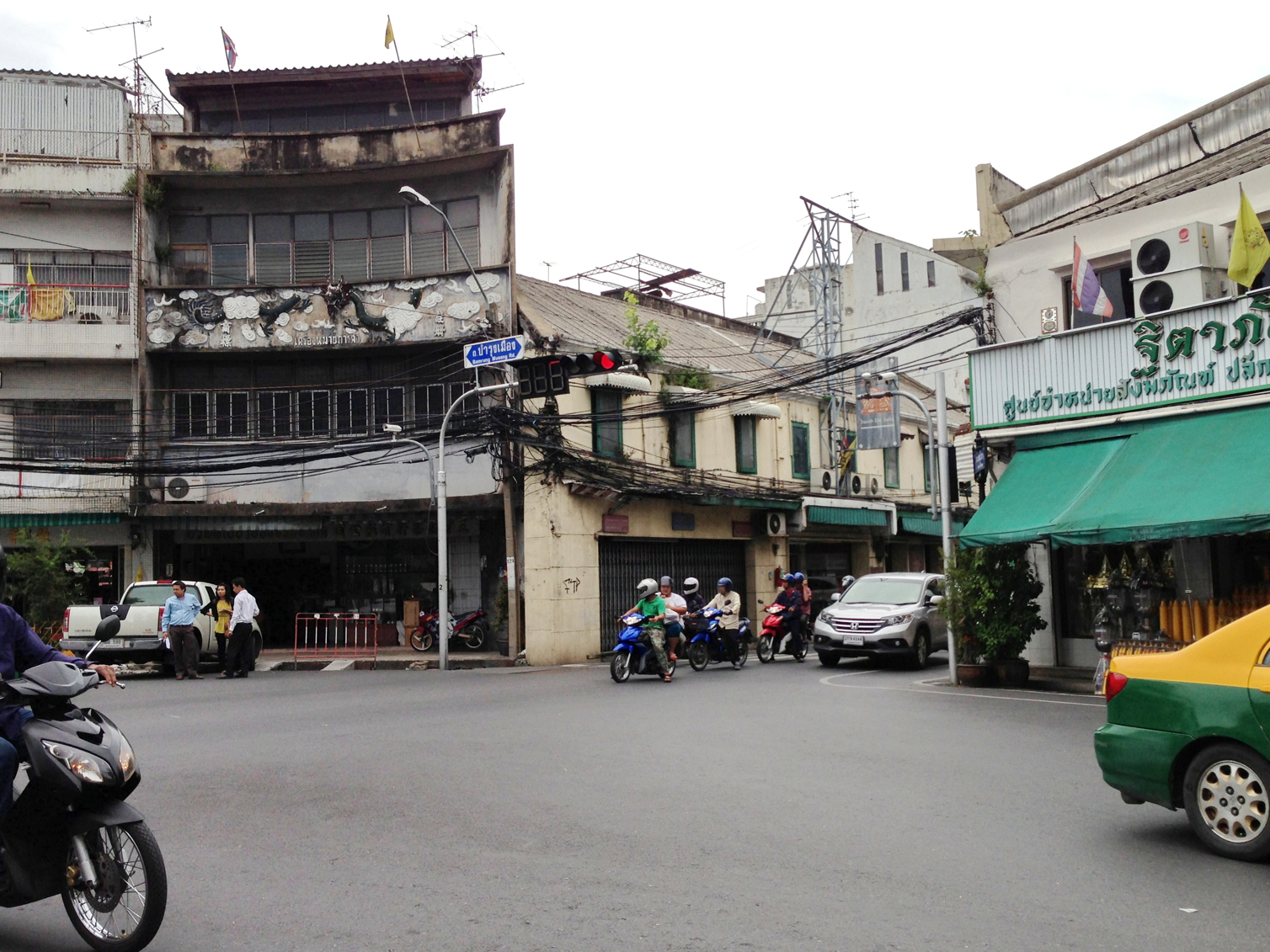 Thanon bamrung muang, Sao chigcha, bangkok